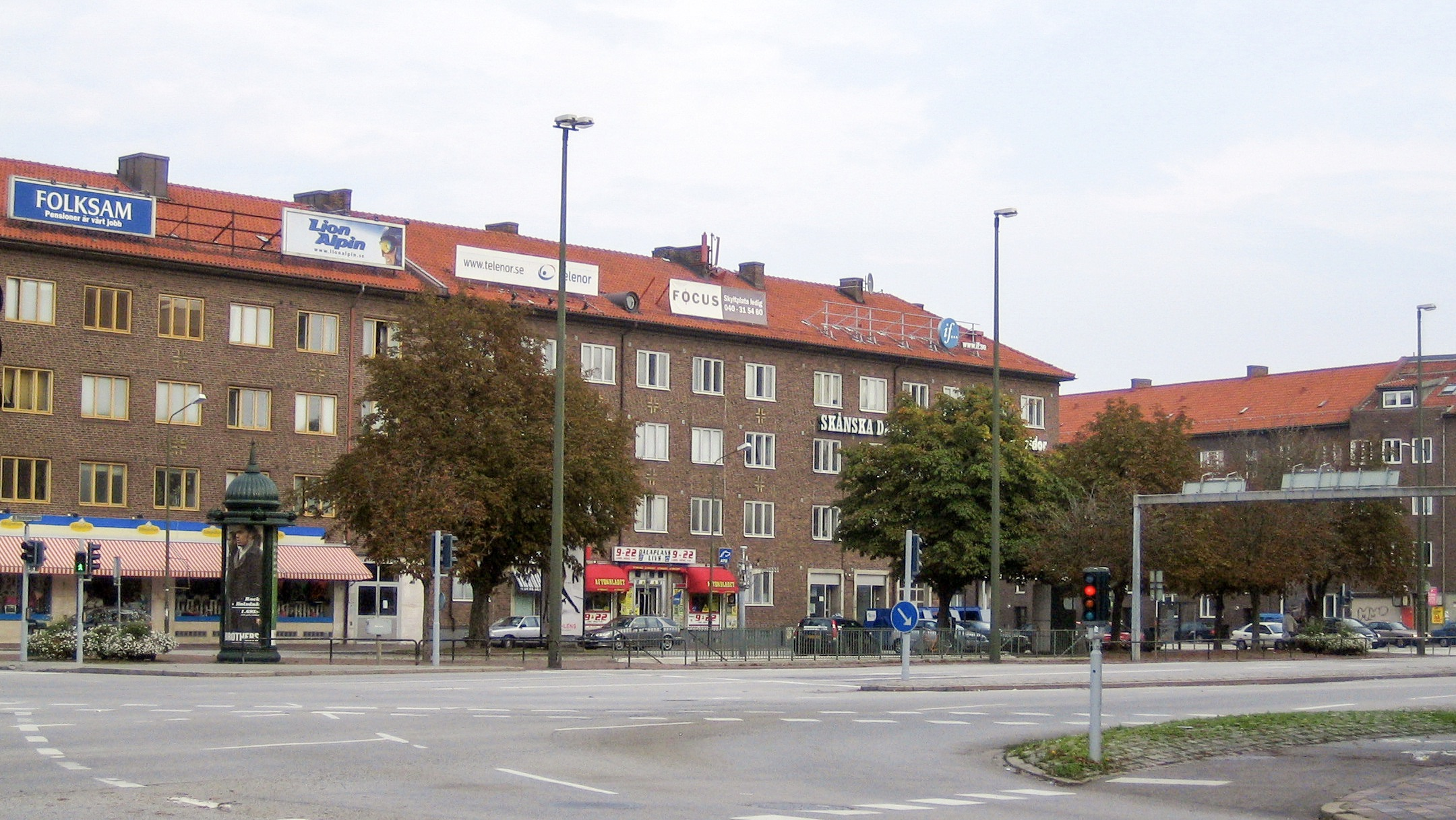 Dalaplan in Malmö, Sweden.